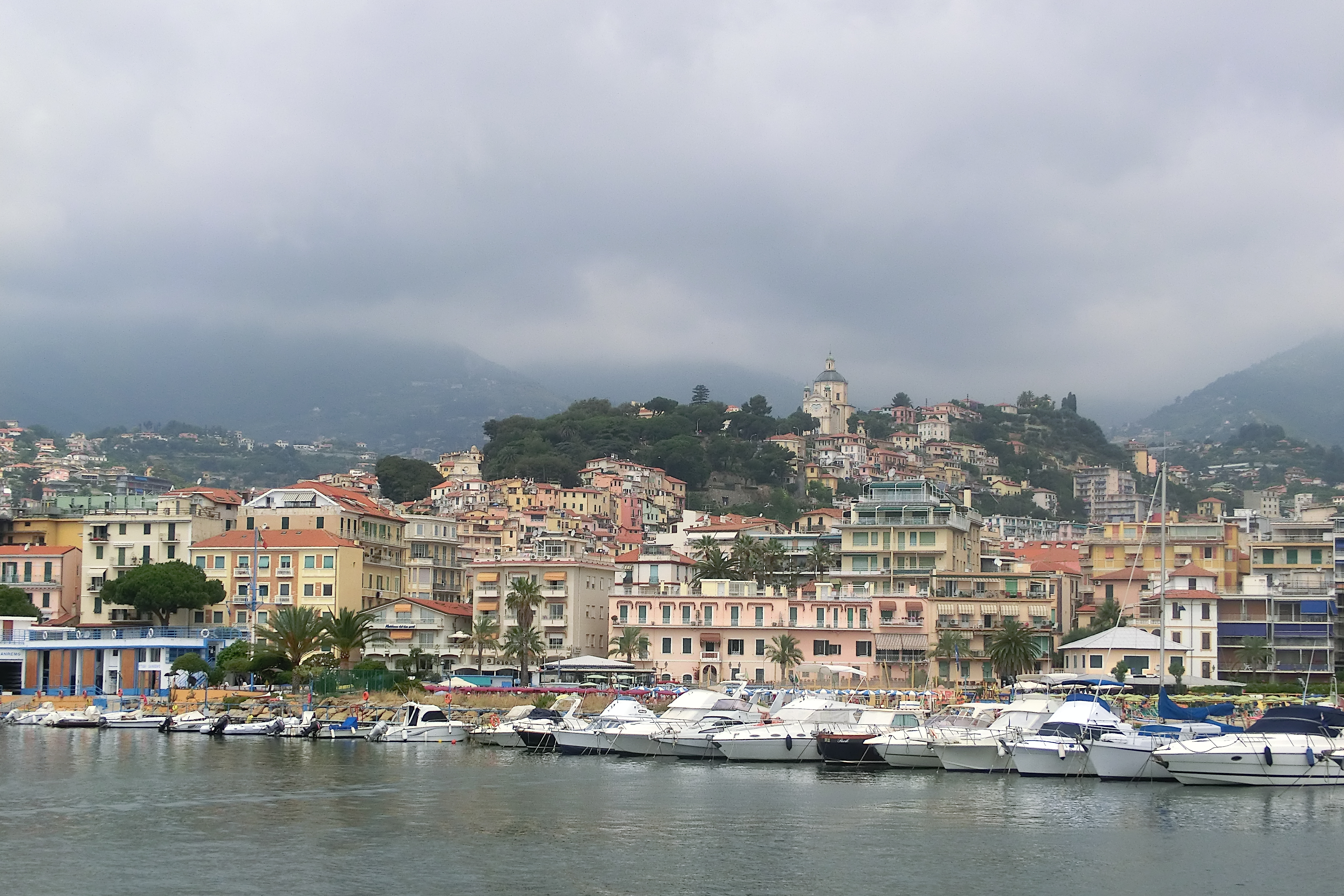 Sanremo dal mare